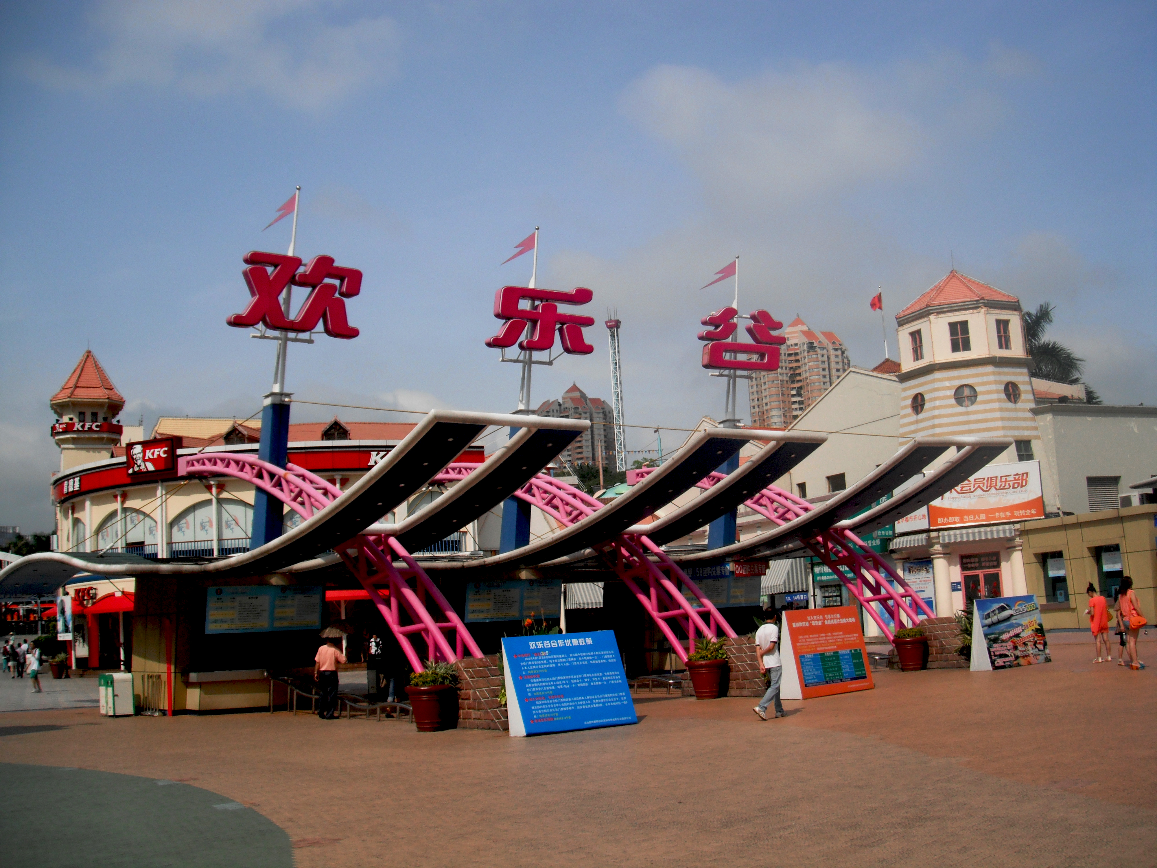 深圳欢乐谷—正门口